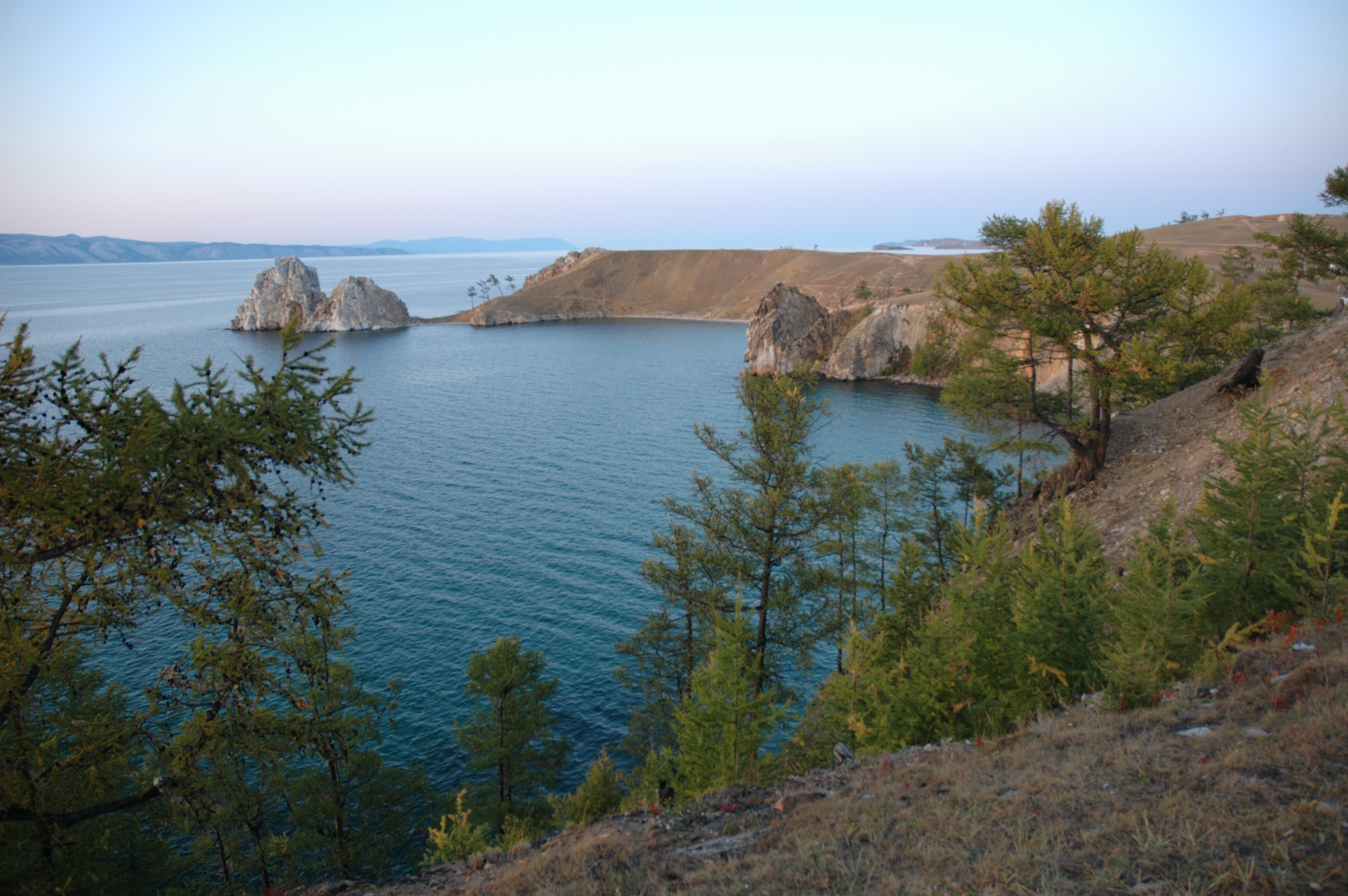 Olkhon Island near Khuzhir, Irkutsk Oblast. Trees are Larix × czekanowskii (natural hybrid L. sibirica × L. gmelinii).